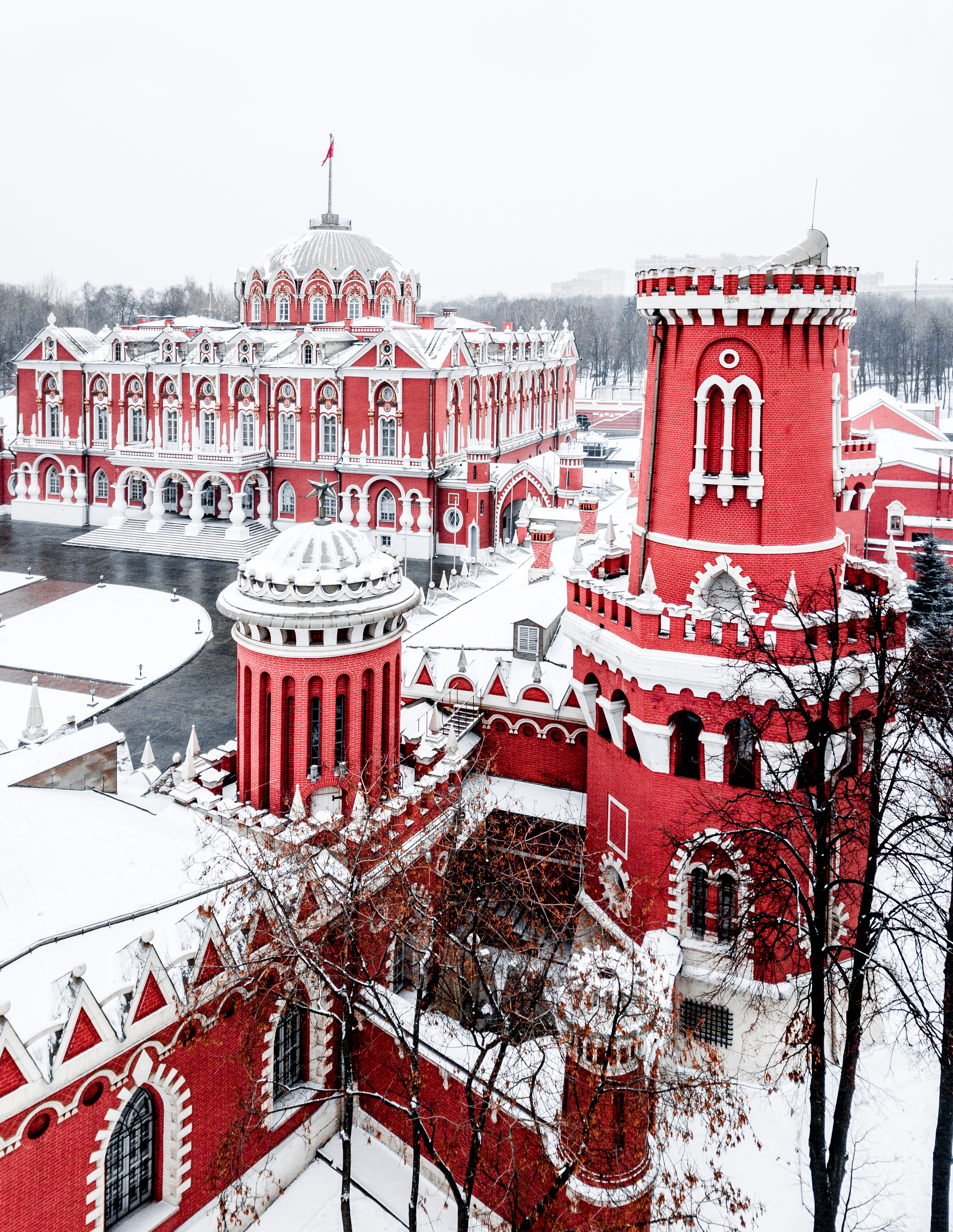 Петровский путевой дворец (зима, 2018)